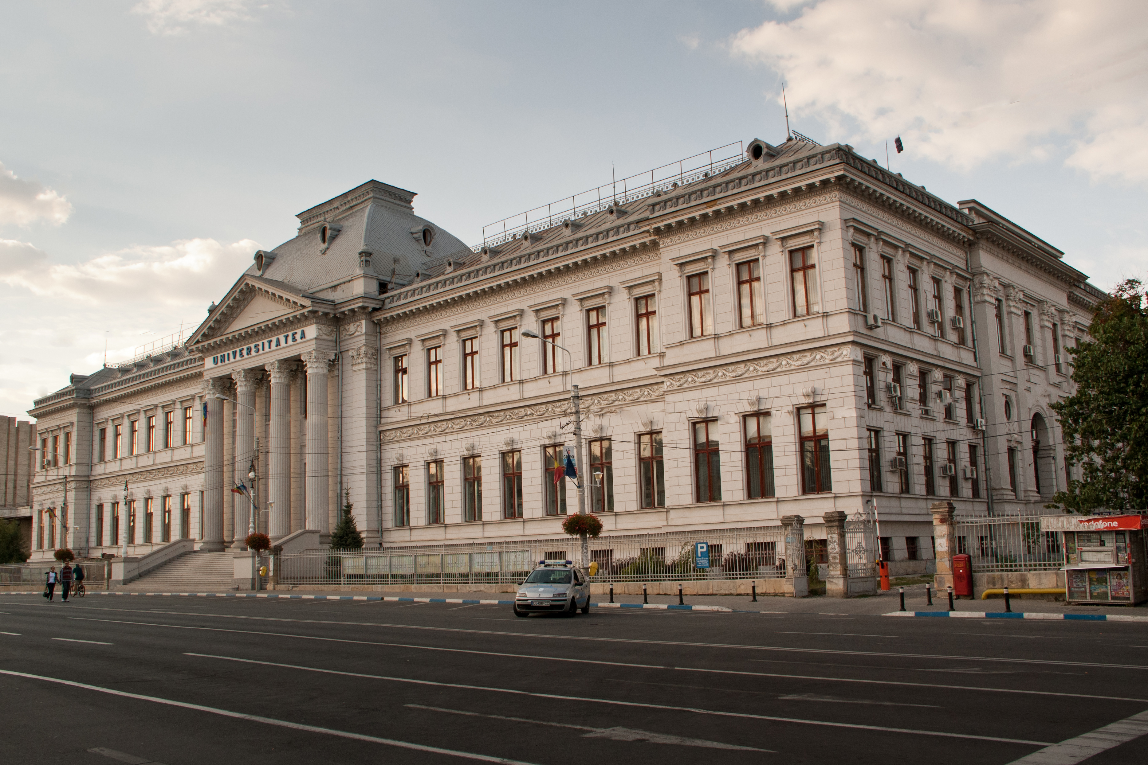 Palatul de Justiție, azi Universitatea din Craiova (rectoratul)